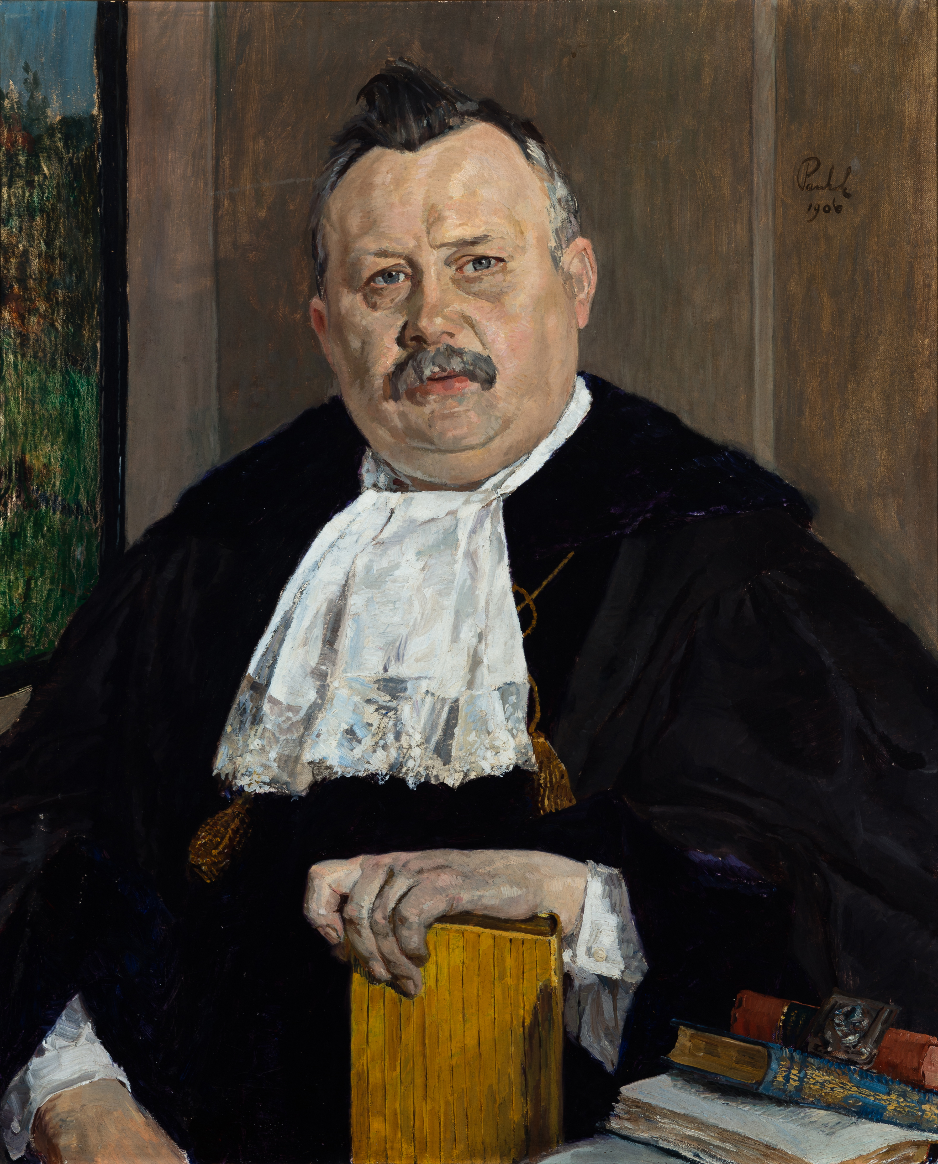 Konrad Lange (1855–1921), Öl auf Leinwand, Künstler Bernhard Pankok